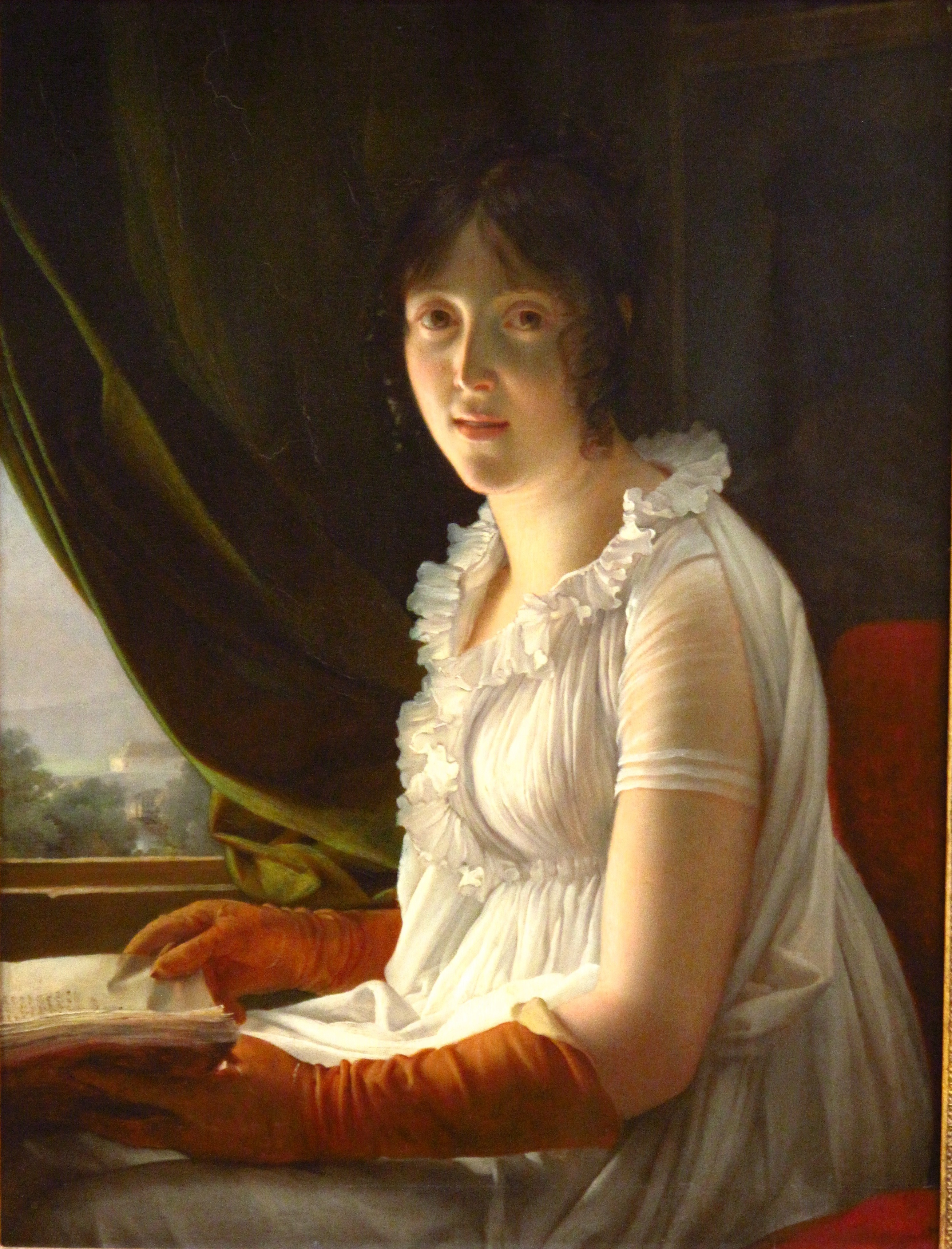 Marie-Philippe-Claude Walbonne, première femme du peintre Jacques-Luc Barbier-Walbonne, ami de l'artiste.